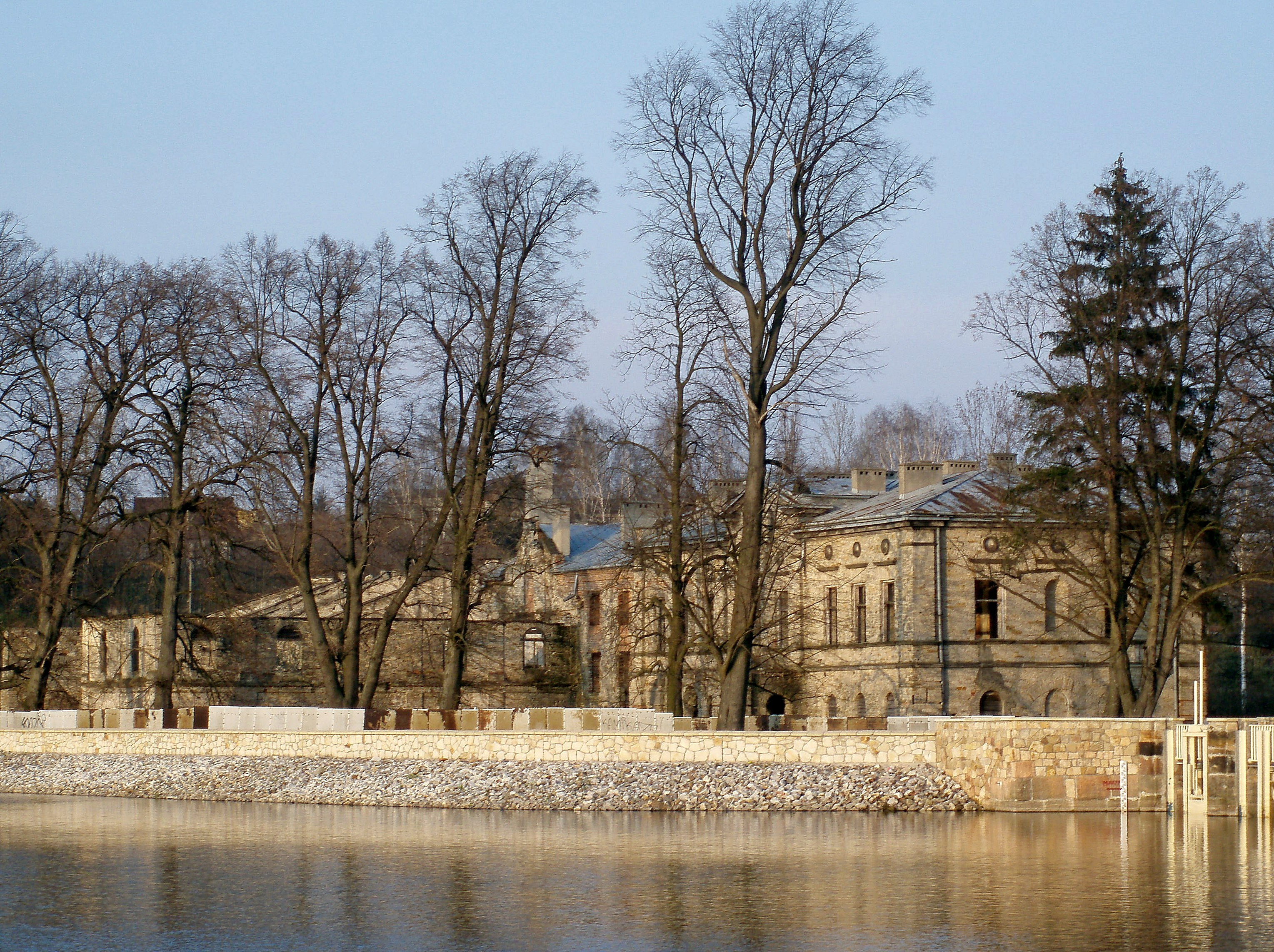 Zespół fabryczny: Dom zarządu, tzw. pałac Schenberga 5 budynków fabrycznych Urządzenia hydrotechniczne z tamą i przepustami Wąchock, Wąchock 838/1-3.